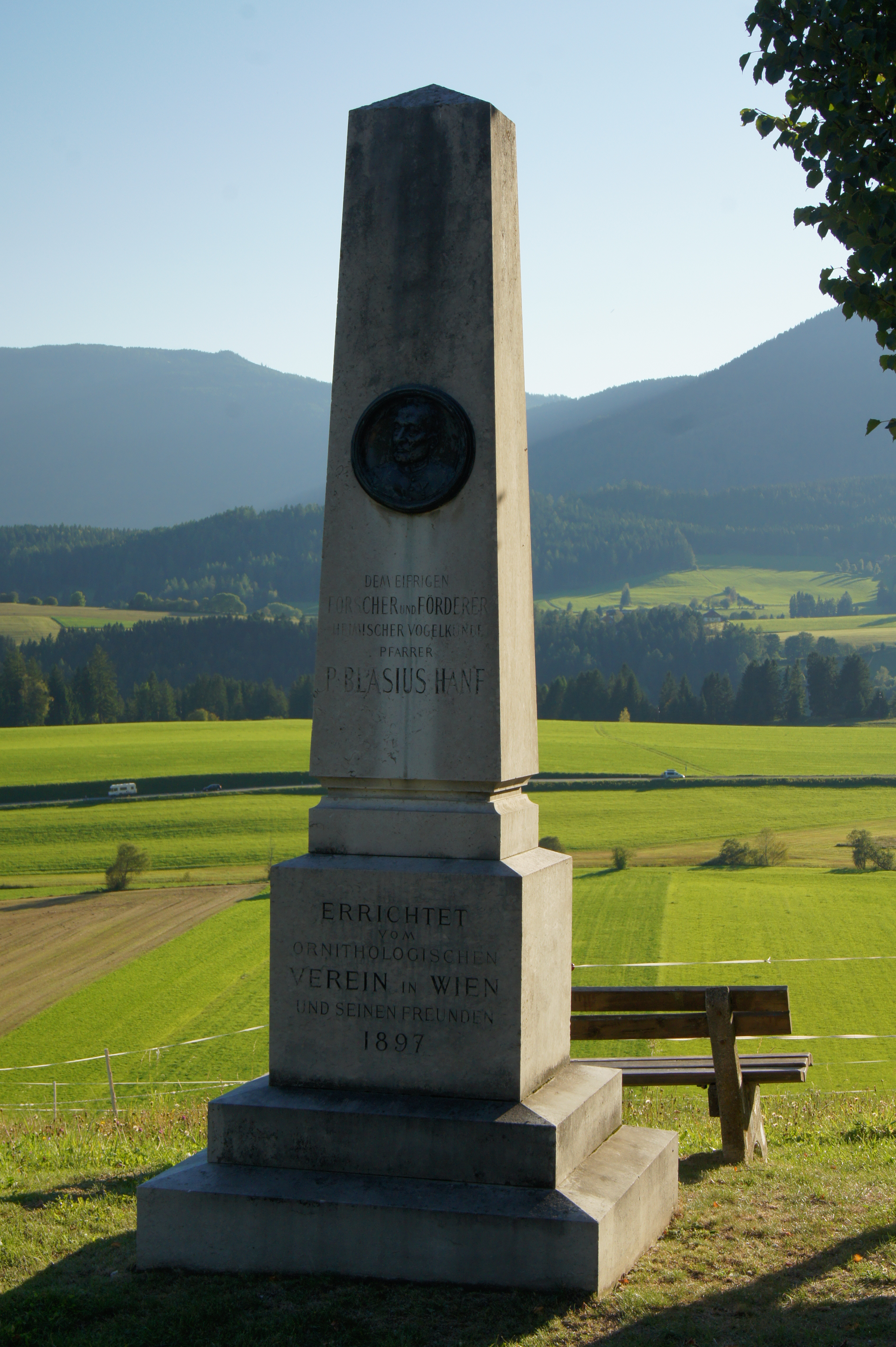 Gedenkstein für Pater Blasius Hanf